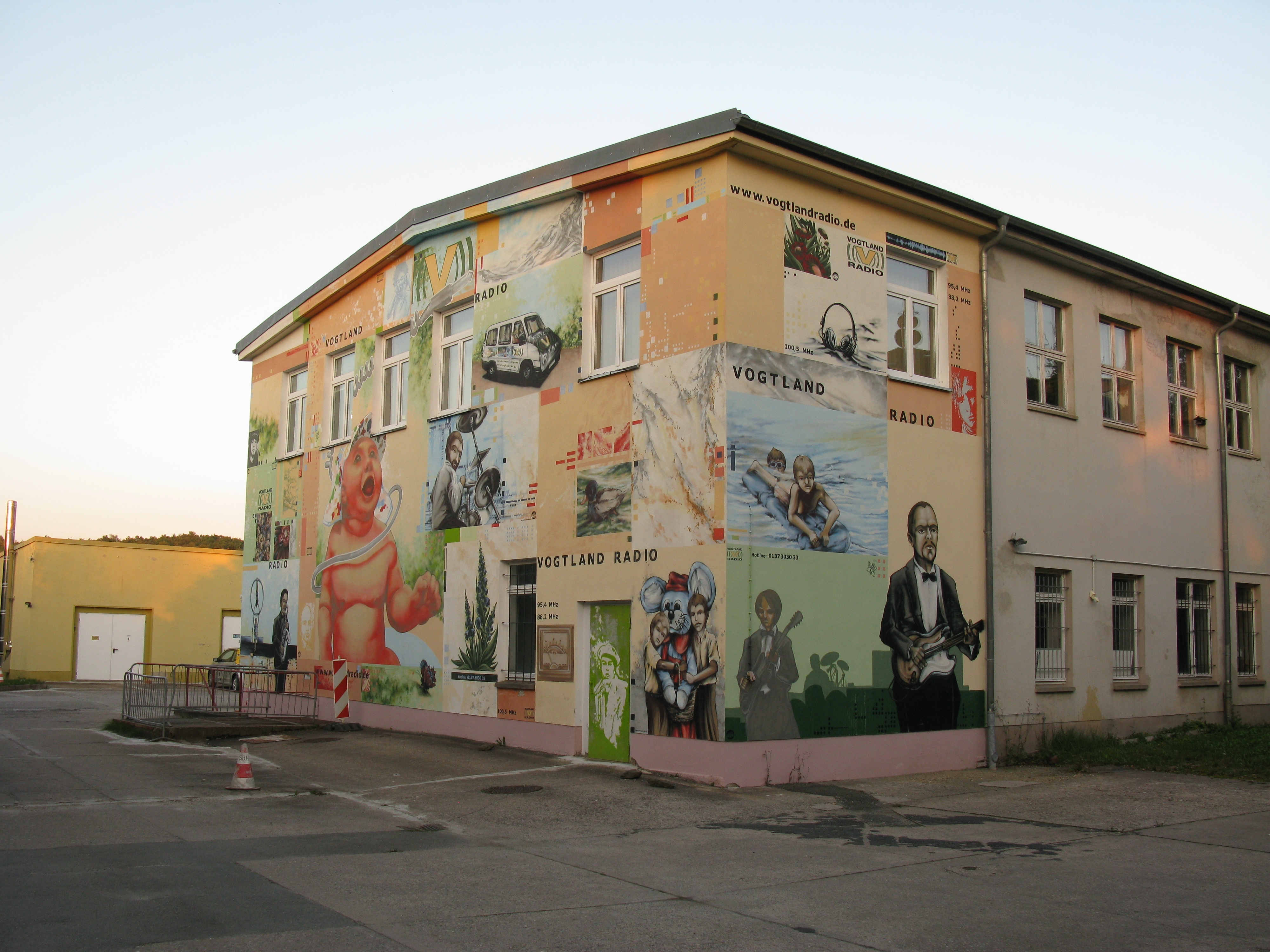 Plauen, Funkhaus des Vogtlandradios in Plauen-Haselbrunn (Haselbrunner Straße 114)